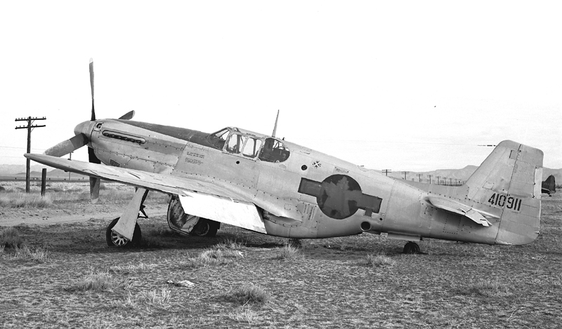 44-10911 at Kingman, Ariuzona, Feb 1947.